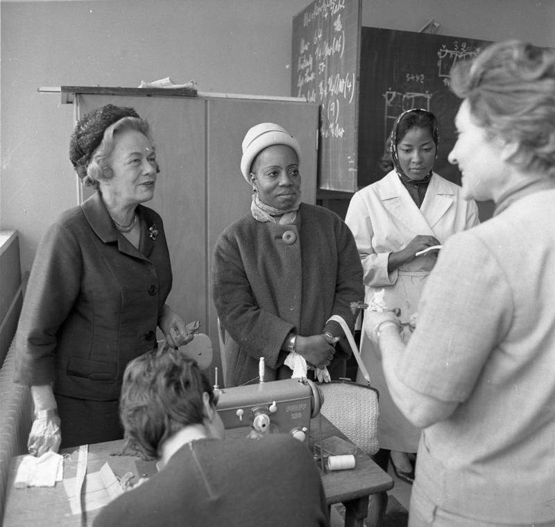 Frau [Wilhelmine] Lübke und Frau Loffo, Staatssekretärin aus Guinea, besuchen die Elly-Heuß-Knapp-Schule in Bonn